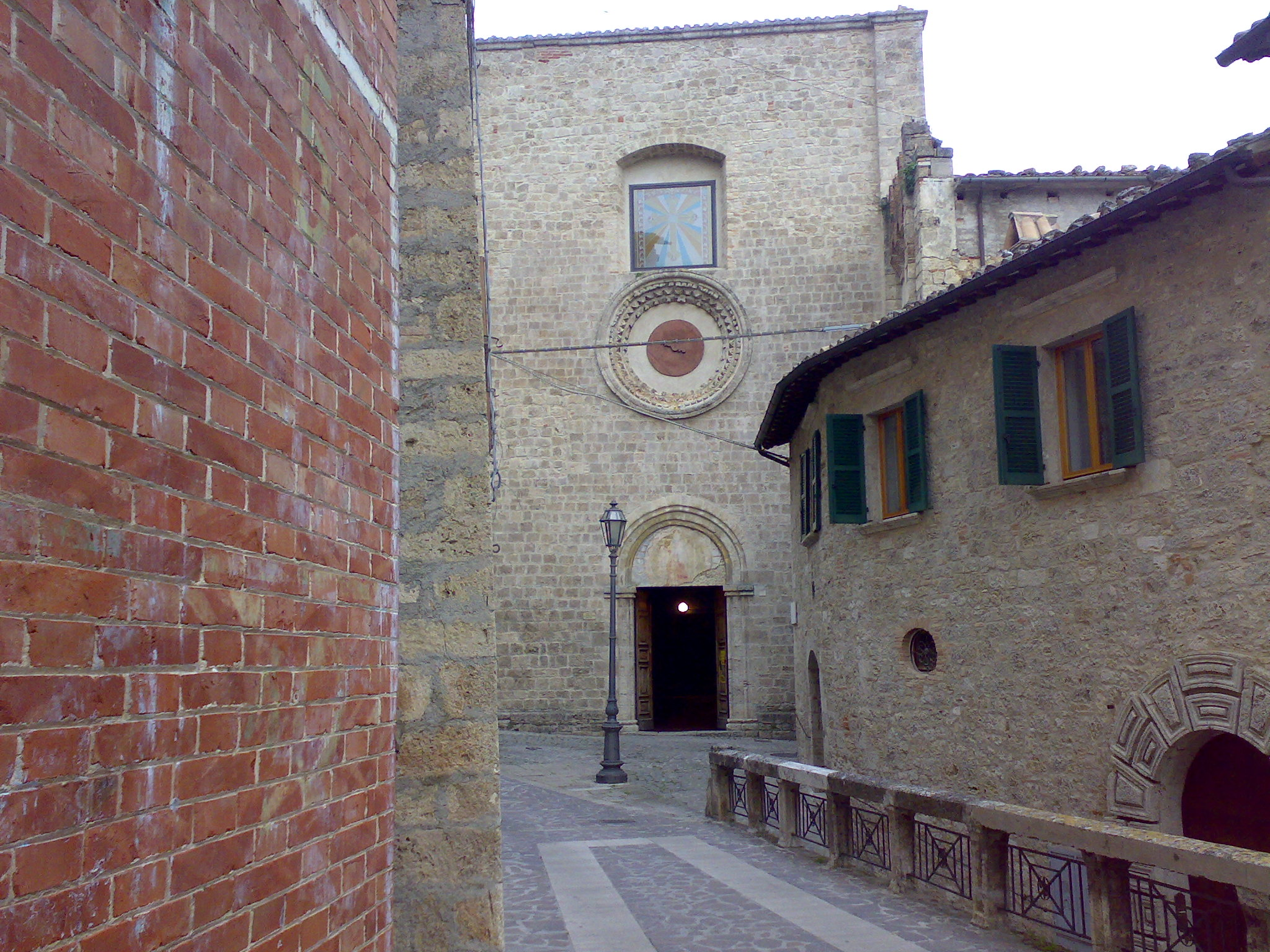 Chiesa di San Francesco (Civitella del Tronto)